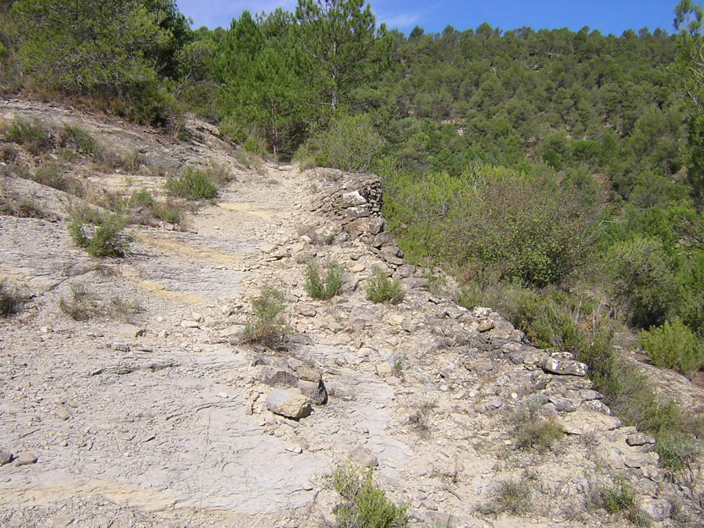 Camí de Sant Pere Màrtir (Monistrol de Calders, Moianès)